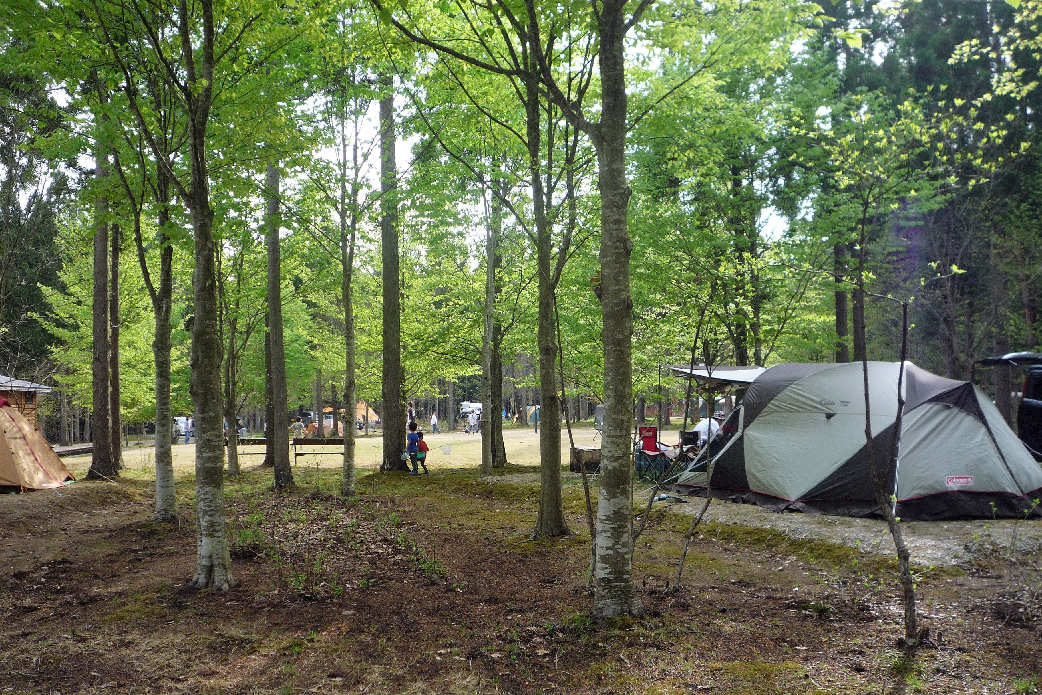 北欧の杜公園 キャンプ場